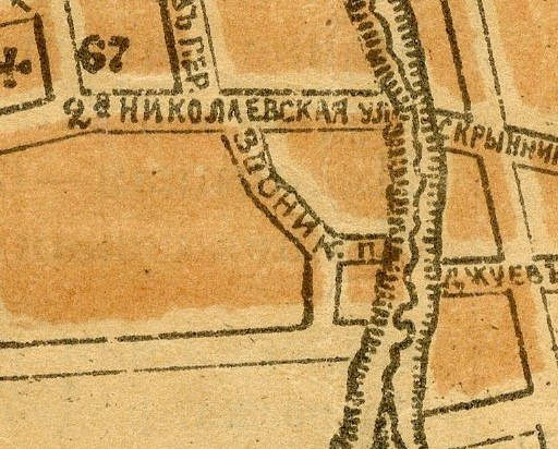 Беларуская (тарашкевіца): Магілёў (Магілёў). Плян места